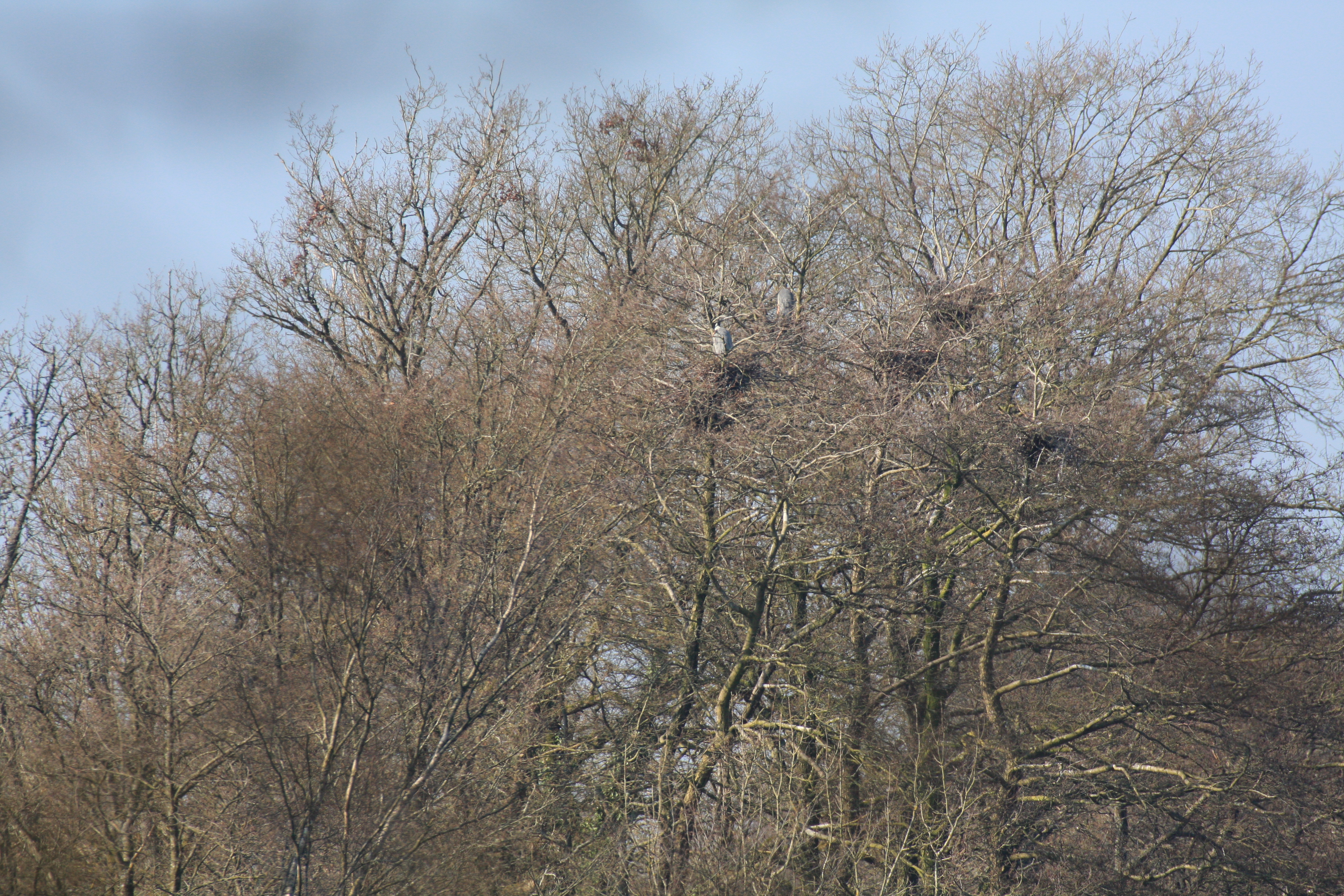 Héronnière